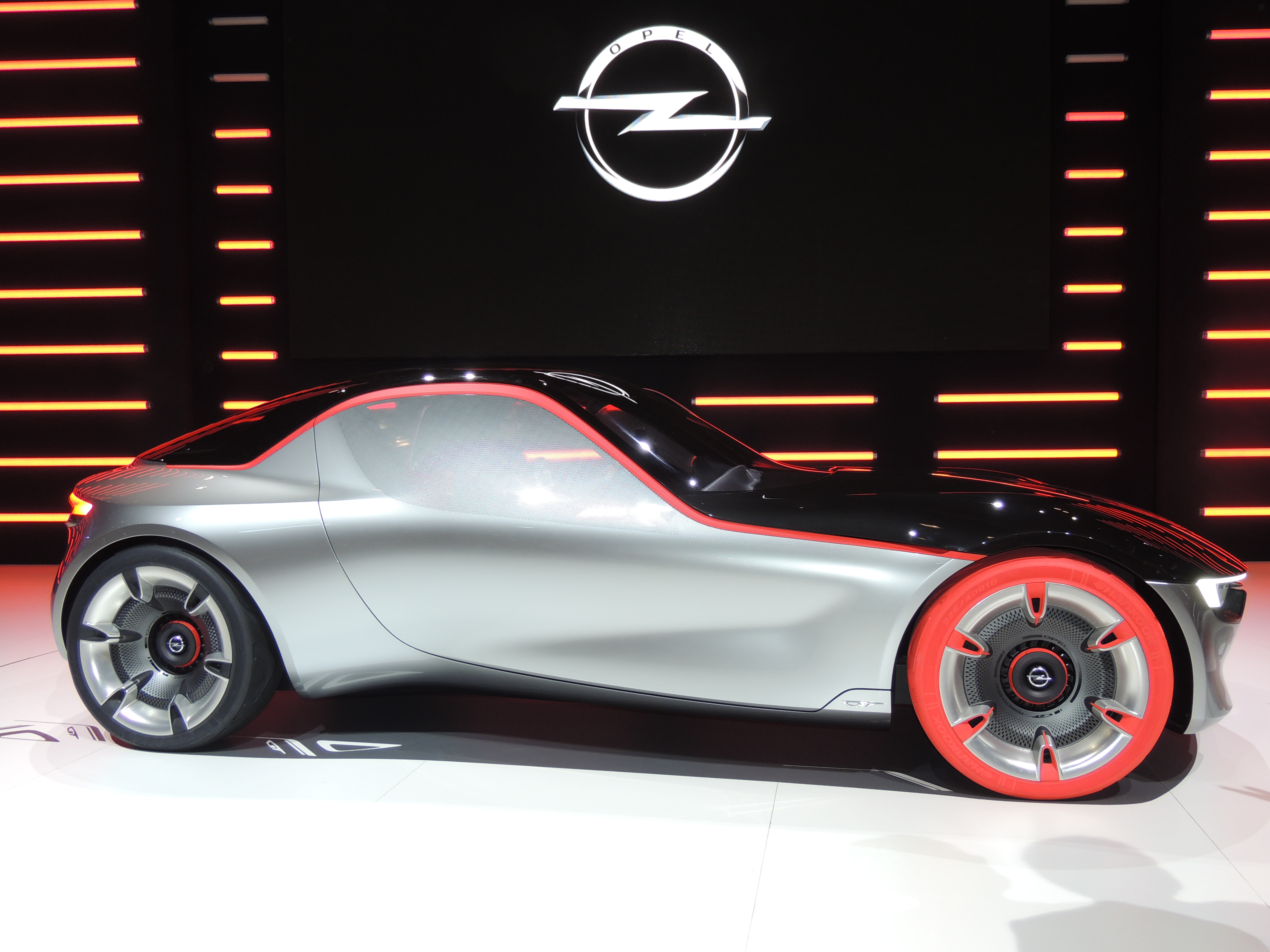 Opel GT Concept, salon de Genève 2016